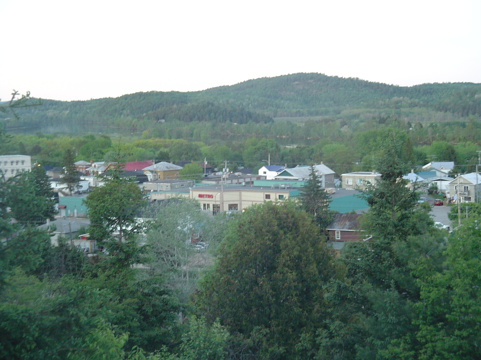 Petite partie du village de Gracefield